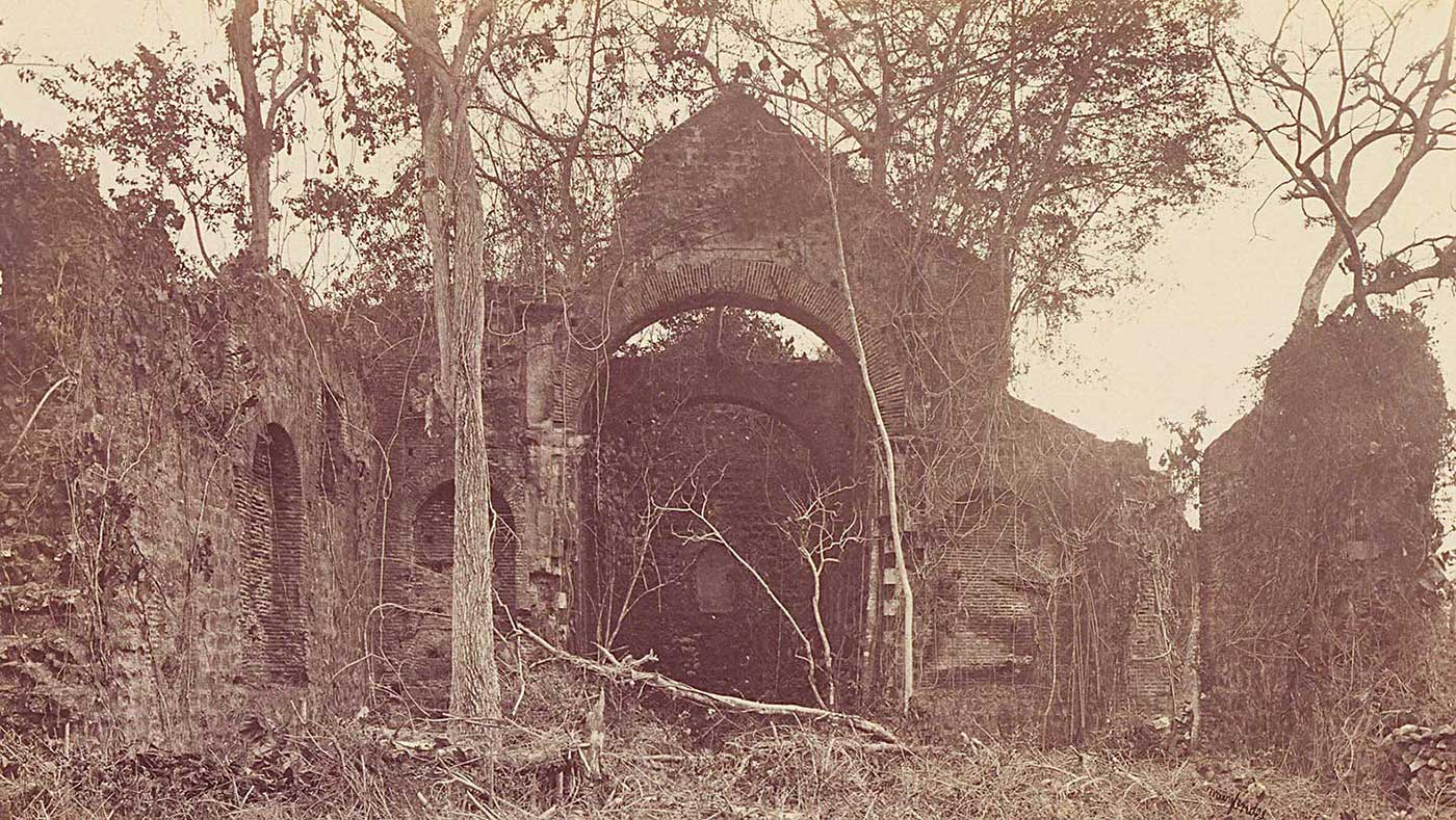 Foto de las Ruinas del Convento de las Monjas, ubicado en Panamá Viejo.